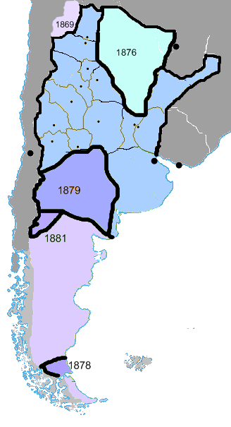 mapa historico argentina antes del tratado con chile 1881